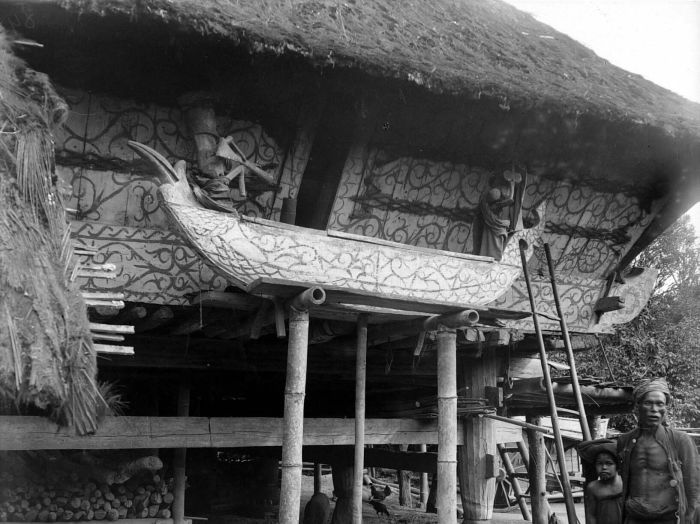 Negatief. "Men lette op het einde v.d. doodkist: de neushoornvogel. In het midden v.d. doodkist bevindt zich een bamboe, welke het water afkomstig v.h. lijk wegvoert." (Adam 1919:42).. Een doodskist (Pêlankah) in Karo, Noord-Sumatra, met een bamboebuis in het midden om het lijkenvocht af te voeren